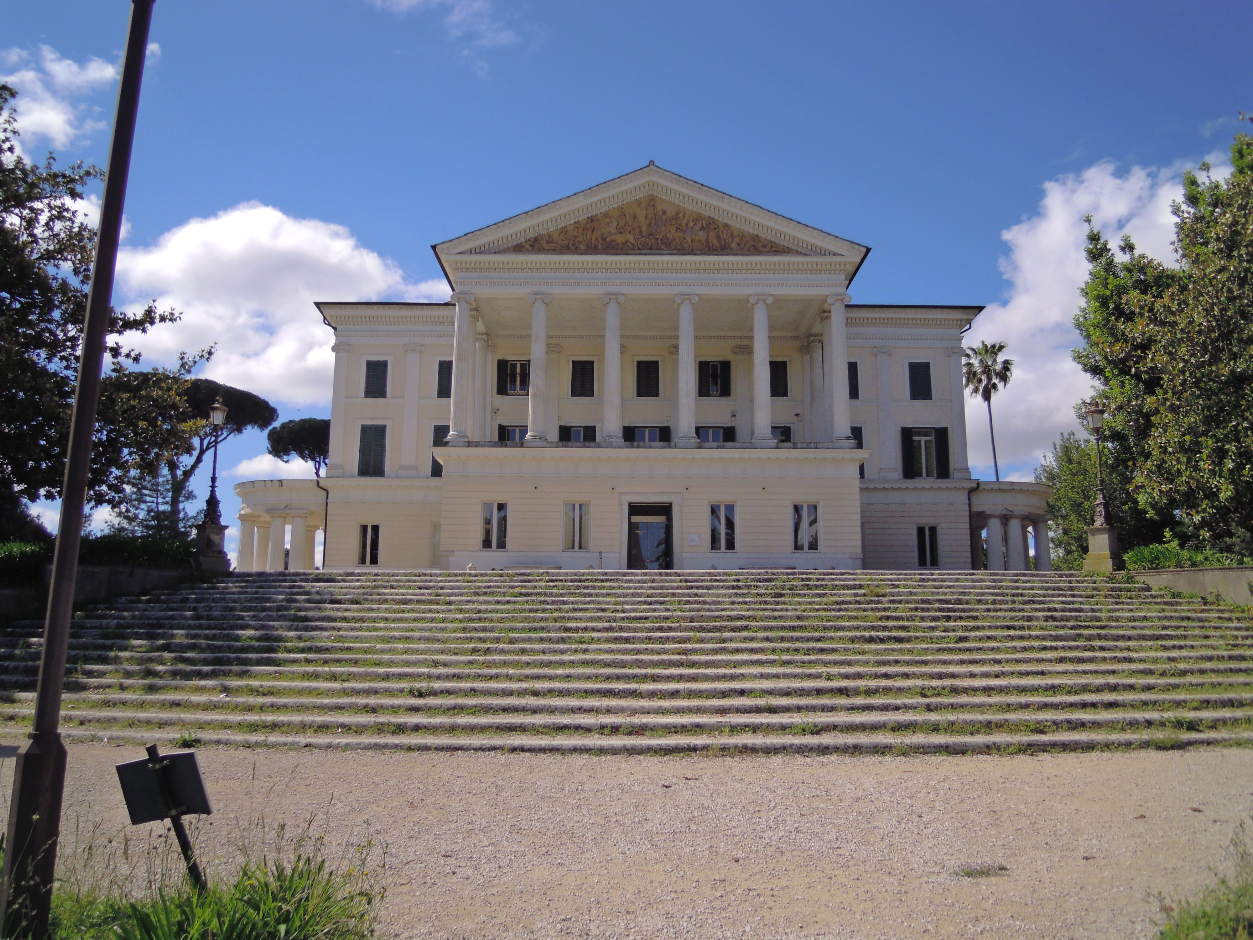 Roma, Villa Torlonia: Casino nobile con pronao e loggia